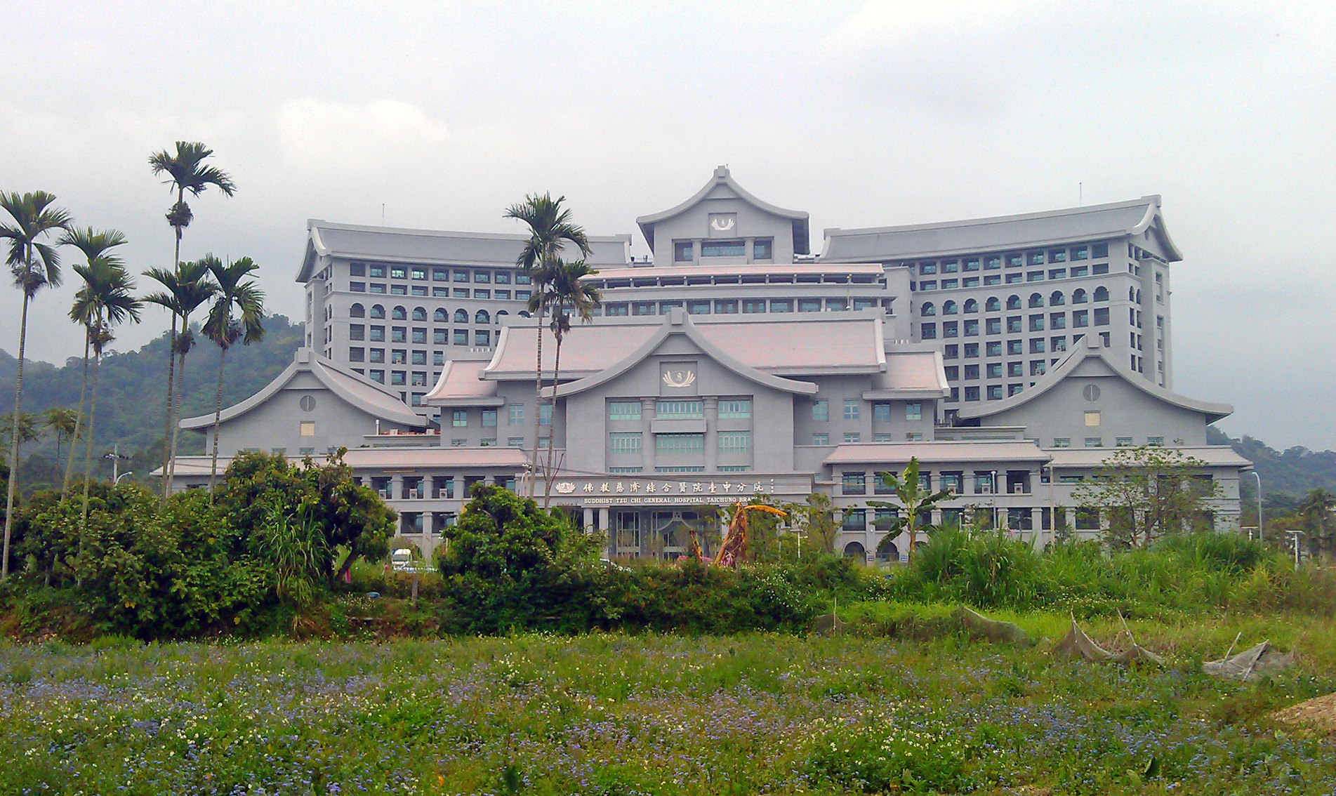 佛教慈濟綜合醫院臺中分院。